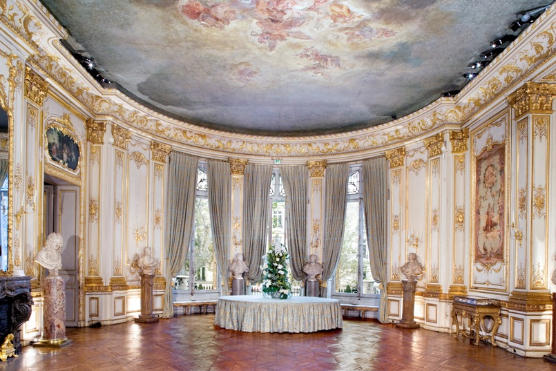 Le Grand Salon